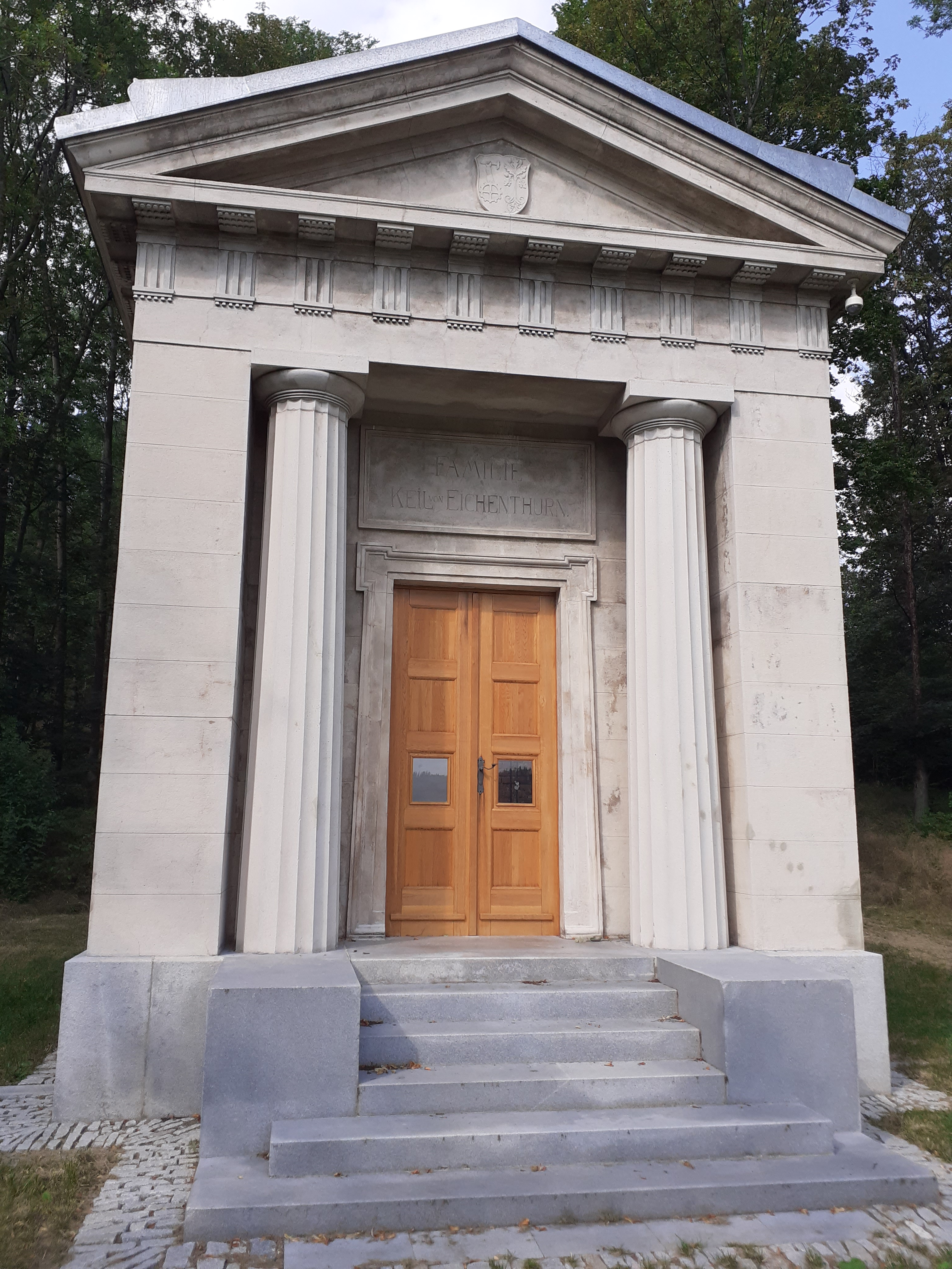 Hrobka rodu Keil von Eichenthurn, Město Albrechtice